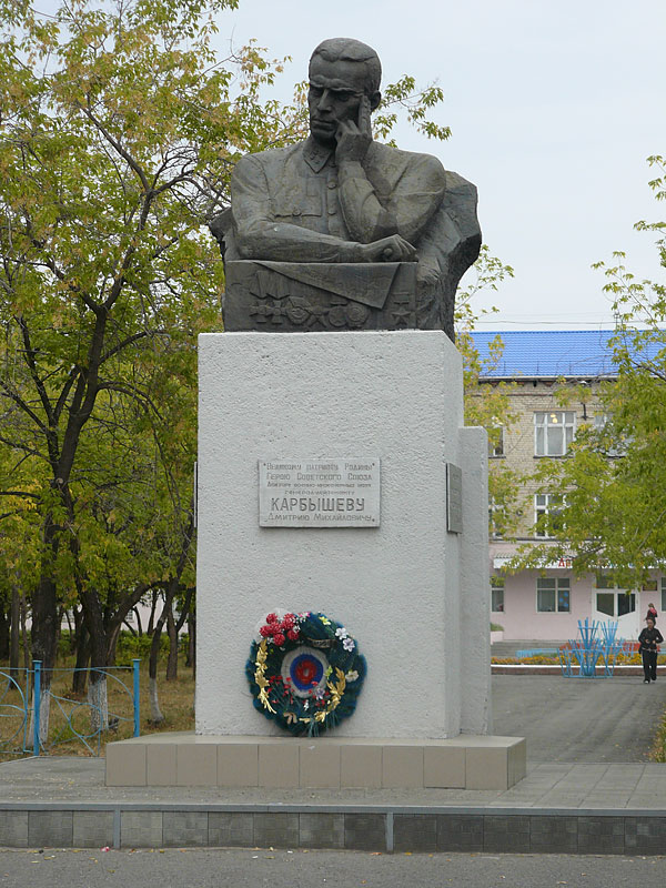 Kurgan.Pro